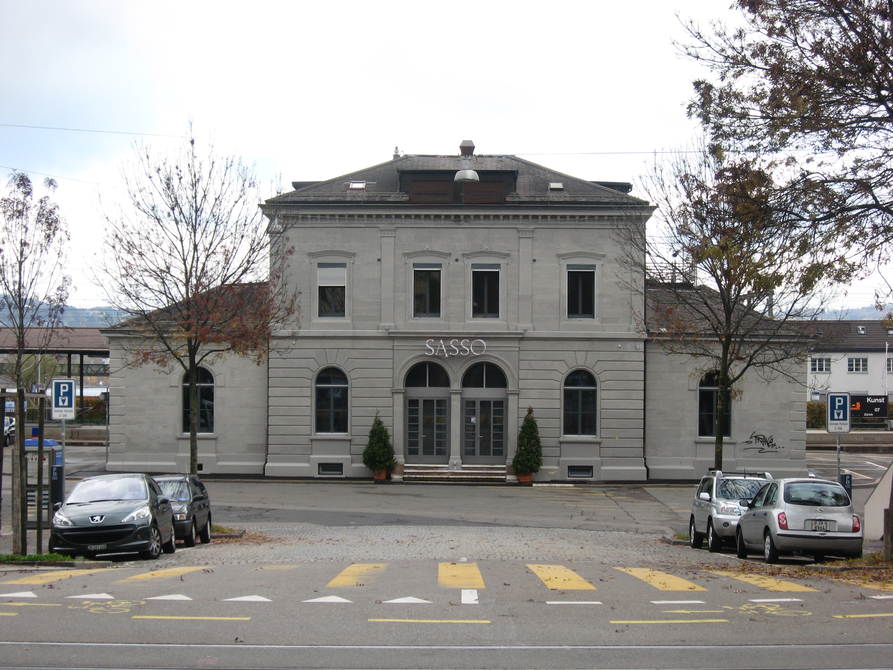 Renovierter Bahnhof Wollishofen, Zürich Wollishofen, Schweiz.